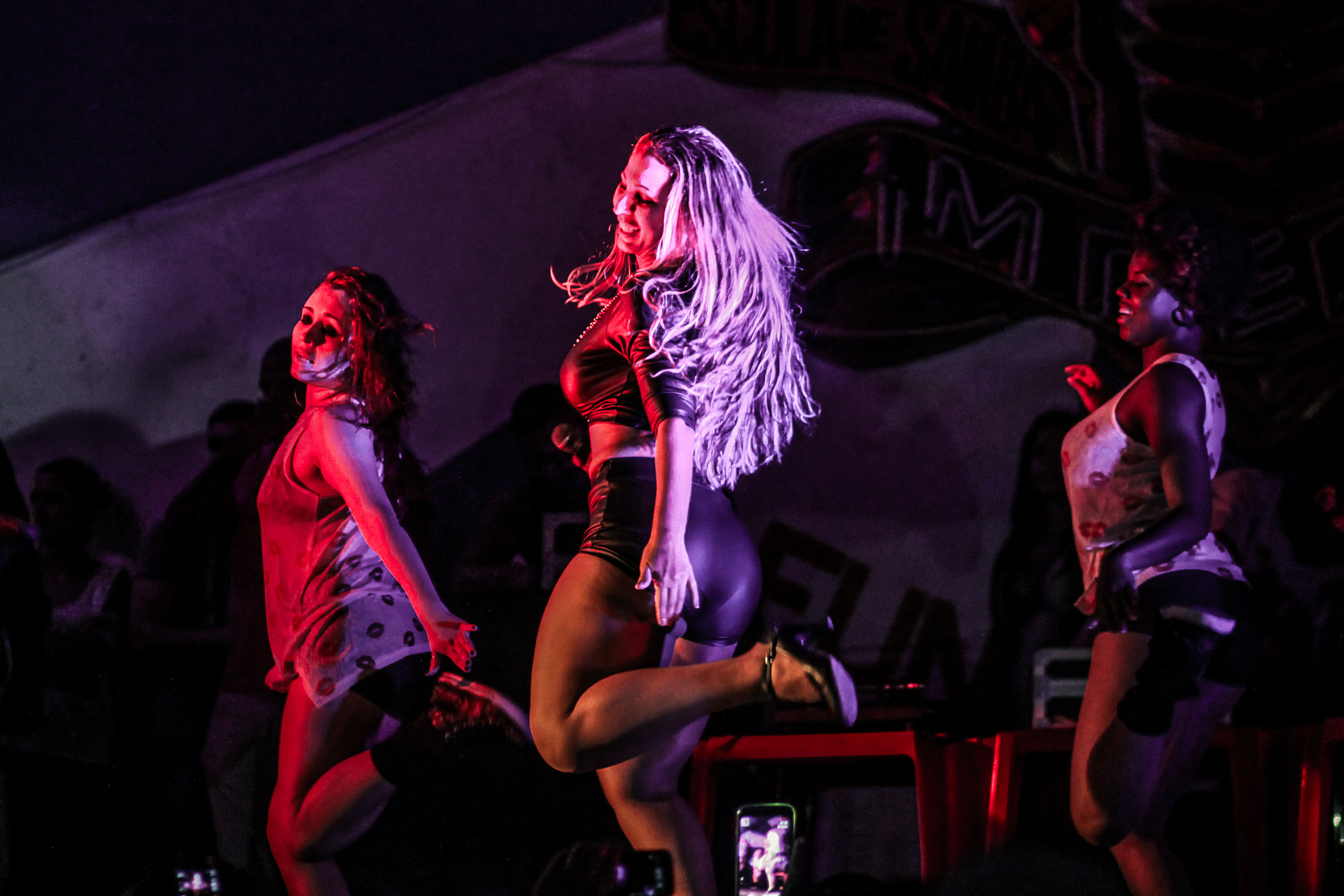 Valesca se apresenta no evento A Liga do Funk, no Império de Casa Verde, Rio de Janeiro, em 2014.